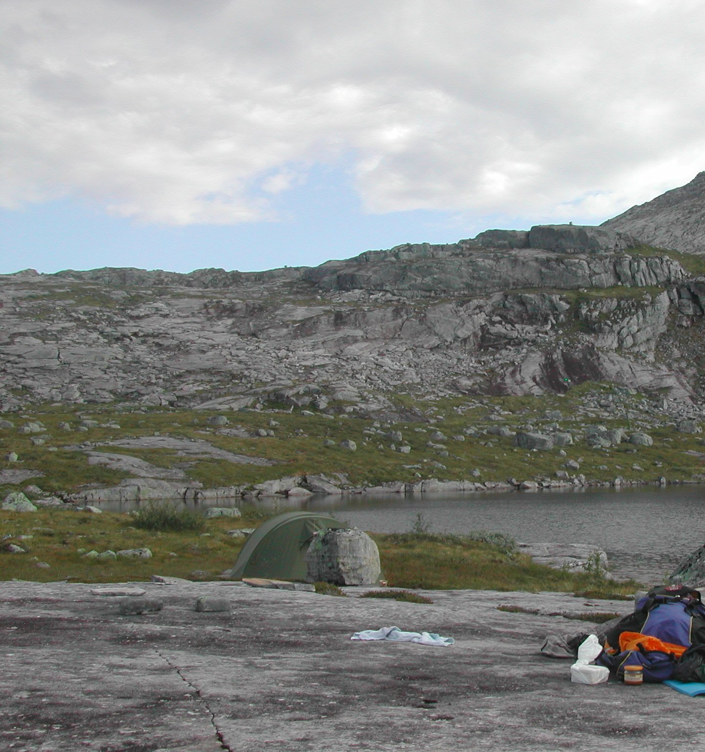 Øvre Breivatnet in Brønnøy, Nordland, Norway